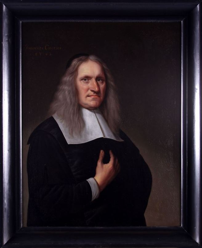 Portret van Johannes Coccejus, professor Oosterse talen, Grieks, en godgeleerdheid aan de Franeker universiteit van 1636 tot 1650.